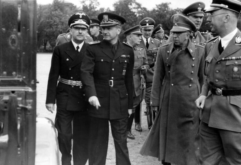 Span. Innenminister besichtigt die Kaserne der SS in Lichterfelde; Serrano Suñer (2. v. links); SS Obergrf. Wolff; Span. General Moscardó; Verteidiger Alcazar; Daluege; Himmler.